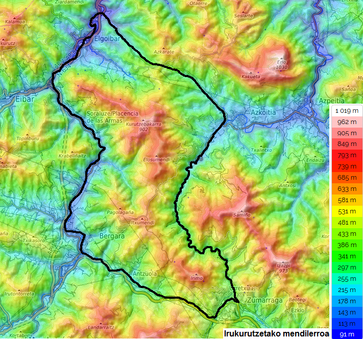 Irukurutzetako mendilerroaren mapa topografikoa.